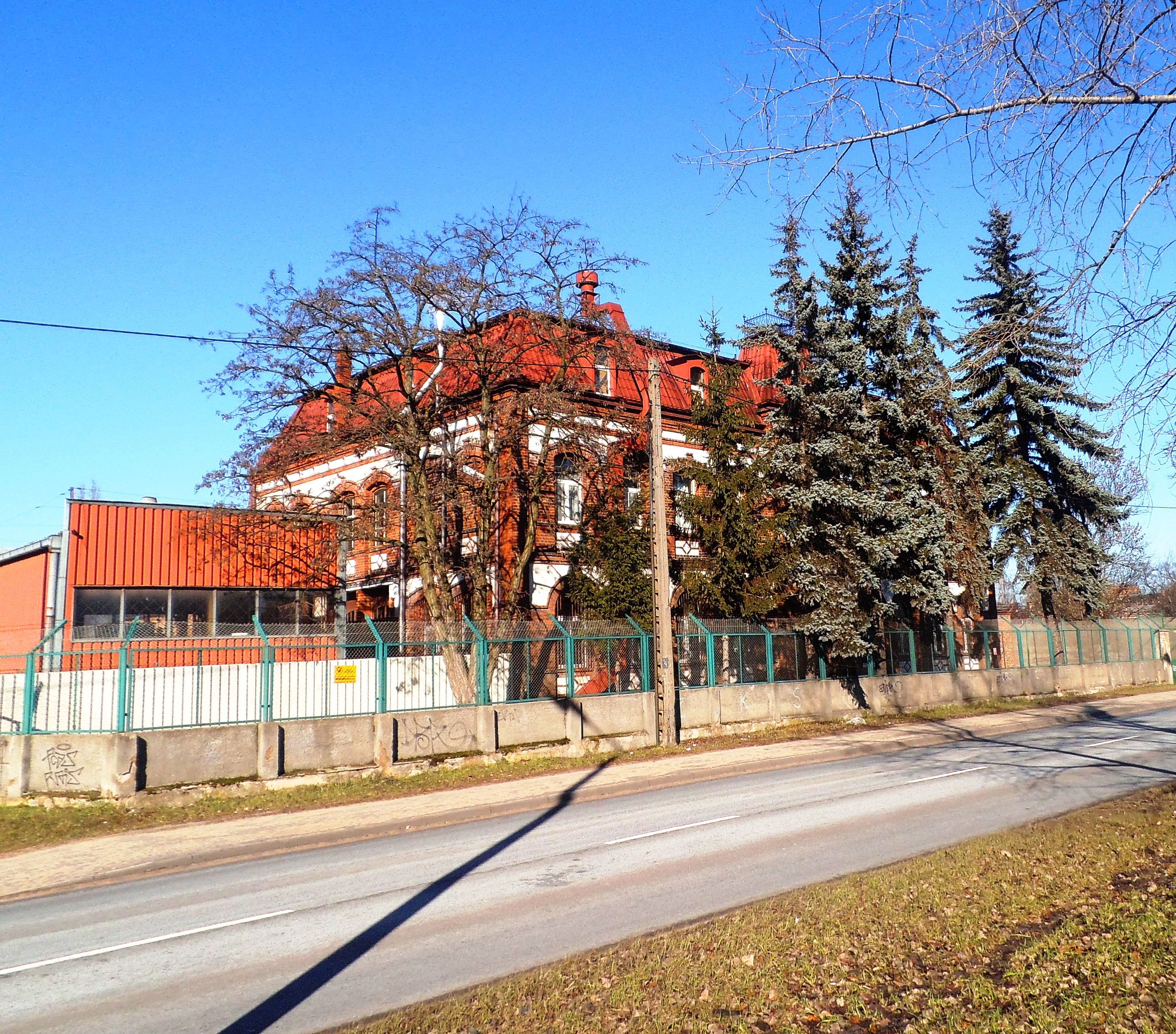 Dawny Zakład Mleczarski w Toruniu, 1905 rok